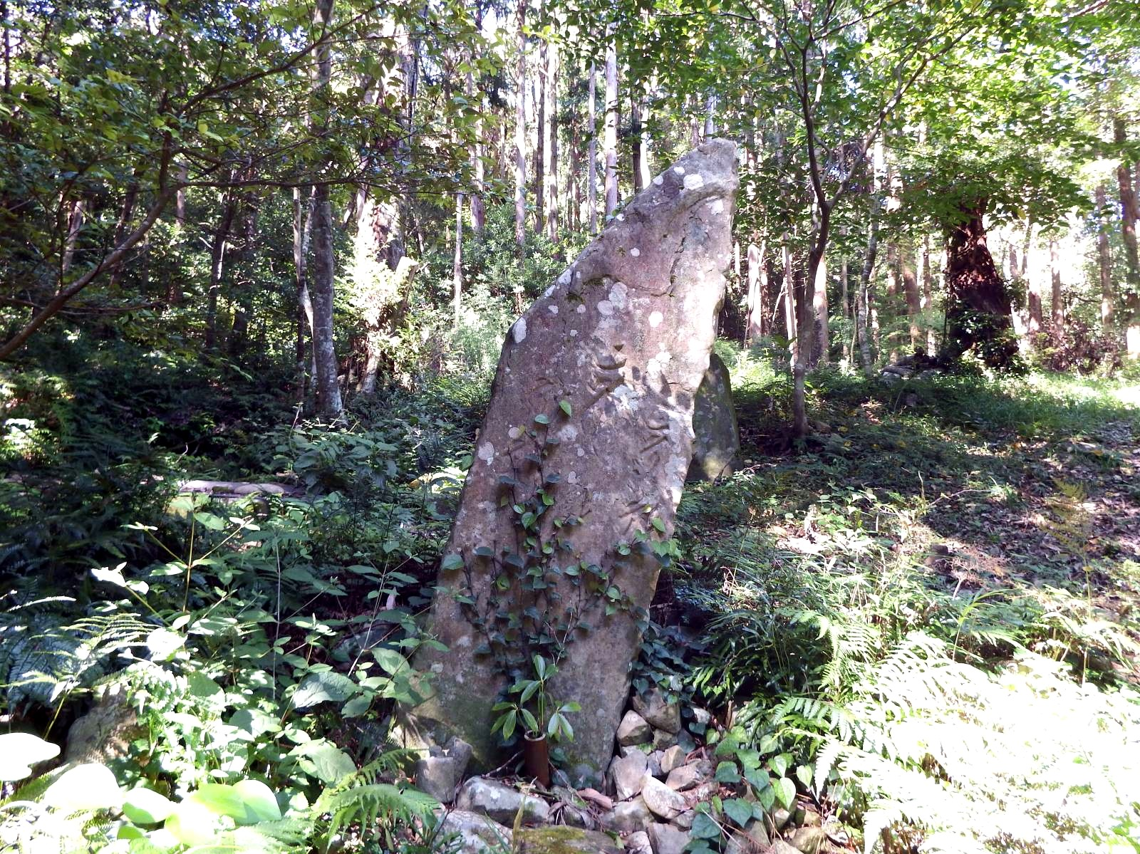 金剛頂寺の五智如来石碑